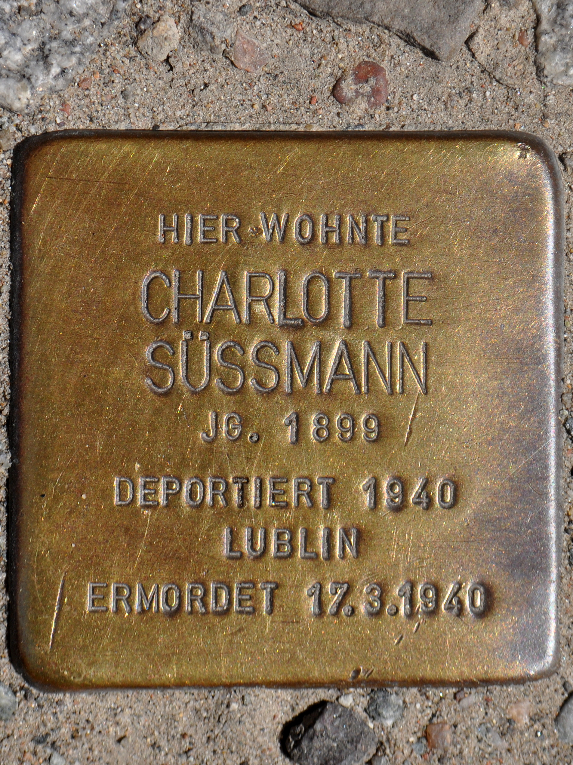 Stolperstein in Stralsund, Ossenreyerstraße HIER WOHNTE CHARLOTTE SÜSSMANN JG. 1899 DEPORTIERT 1940 LUBLIN ERMORDET 17.3.1940